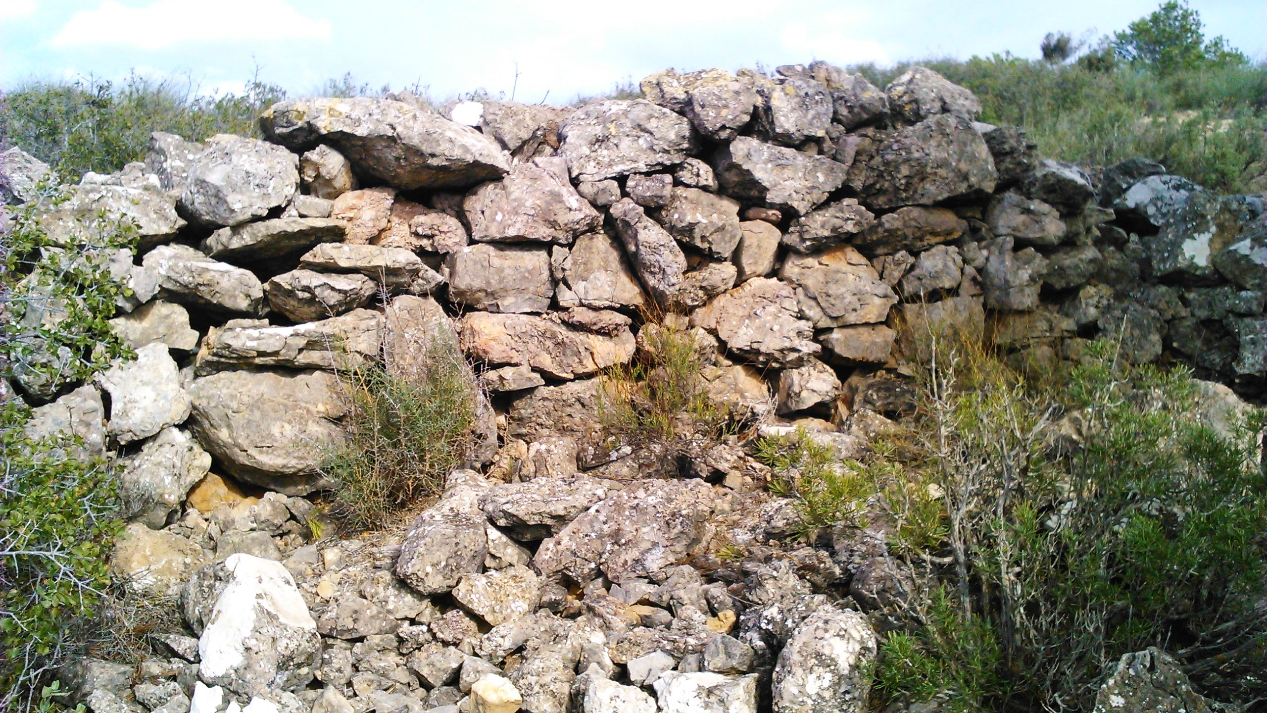 Restos de muro fenicio en Camara, Elda.